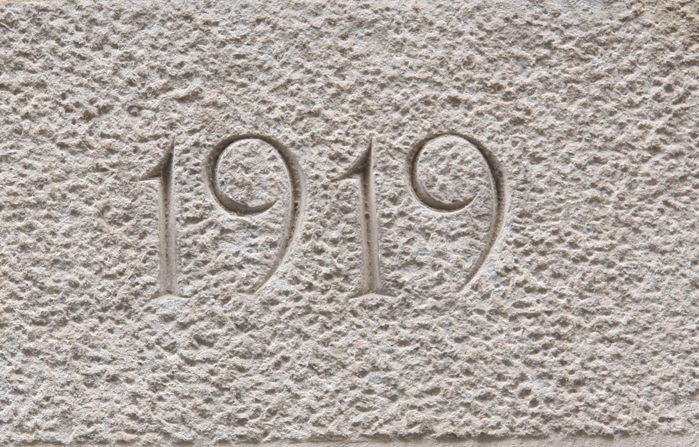 Dintell d'un edifici del carrer Major d'Olot